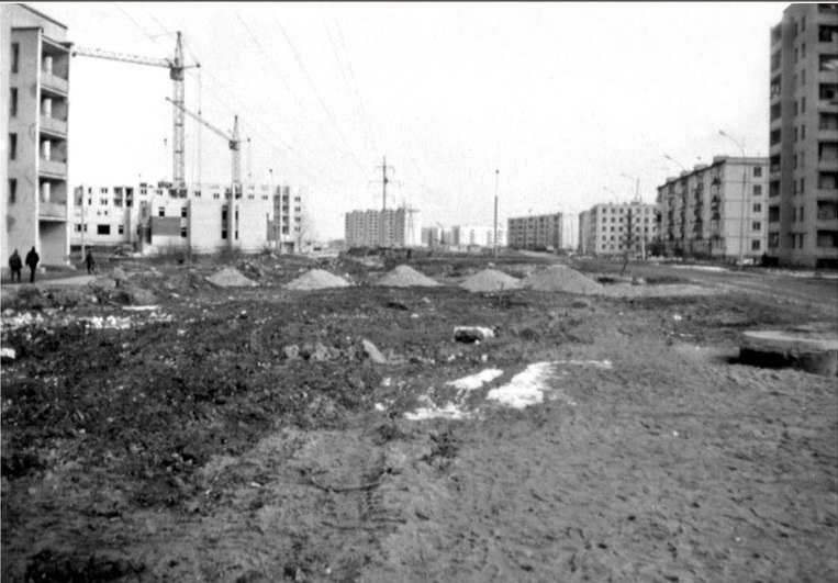 Строительство ул. Северная, конец 1980-ых гг.